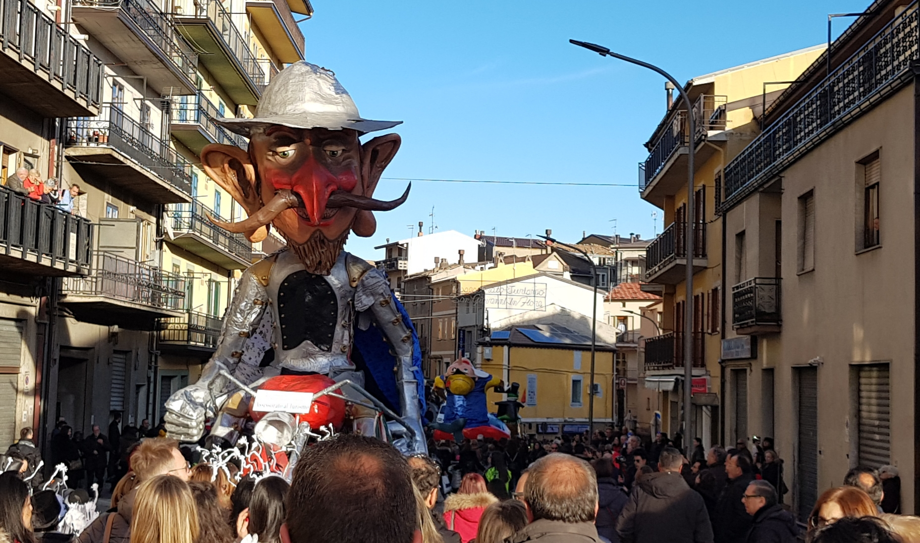 Carri del carnevale di S. Giovanni in Fiore.